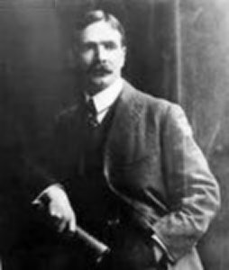 Alexander McAdie (1863-1943)